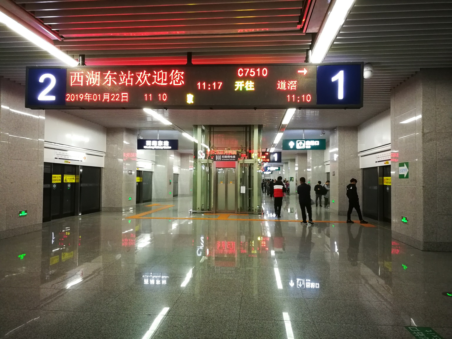 西湖东站月台内景